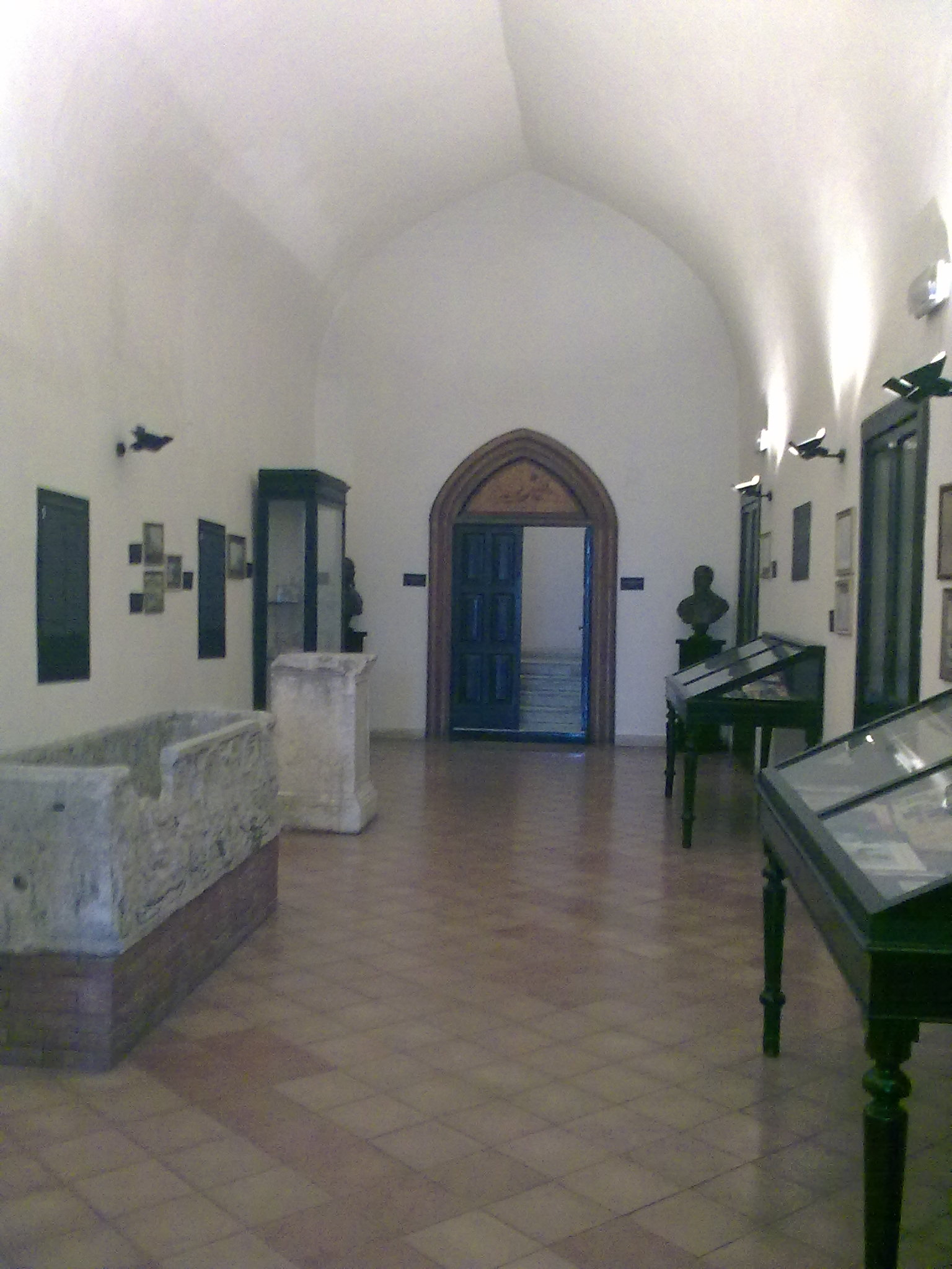 Galleria d'ingresso del Museo Provinciale dell'Agro Nocerino, Nocera Inferiore